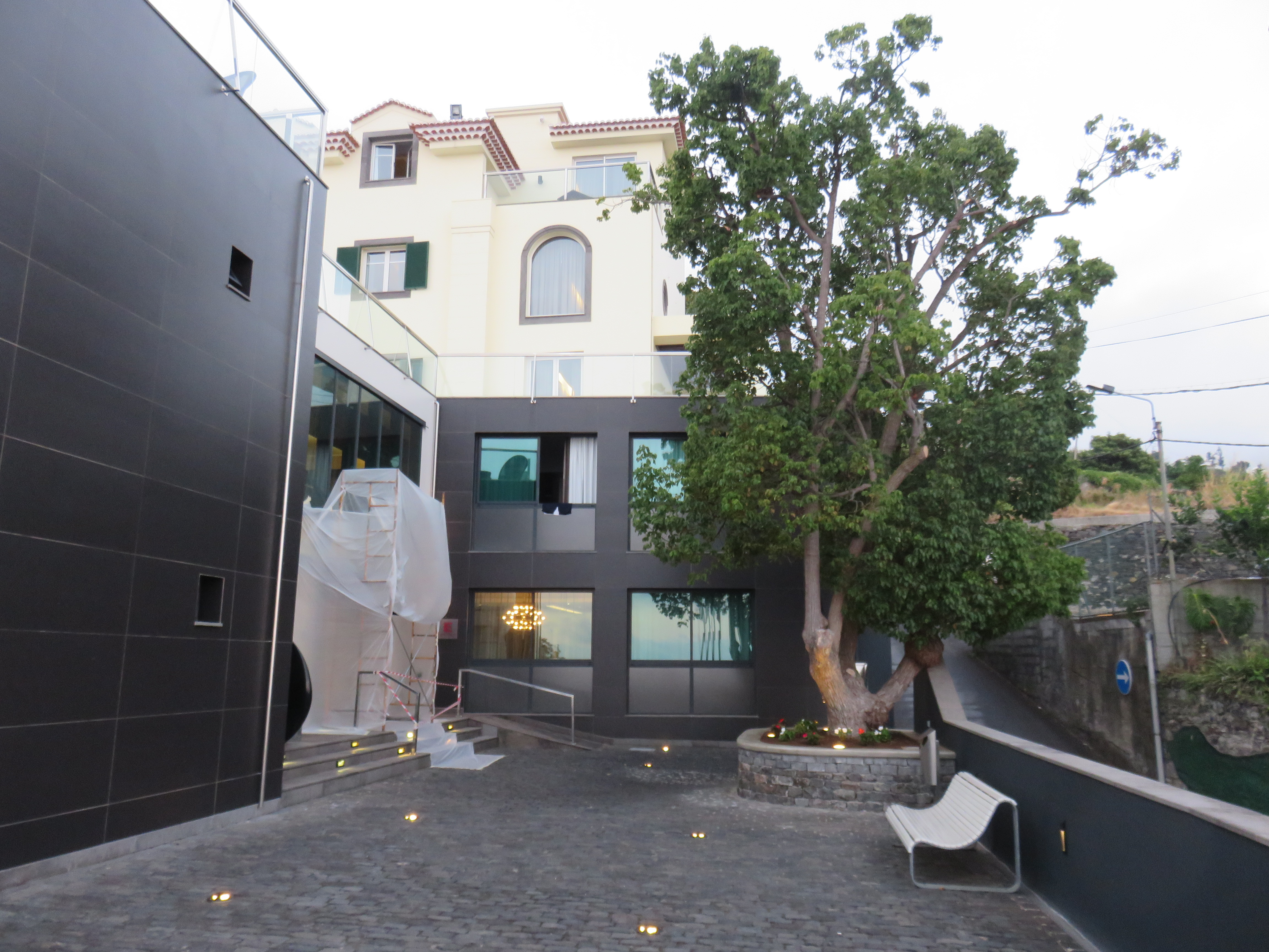 Quinta Mirabela - hotel no Funchal, Madeira, Portugal Cultural property Quinta Mirabela, Monte, Funchal, Madeira, Portugal Q66815975, Wiki Loves Monuments ID: DRC-M-22030201x